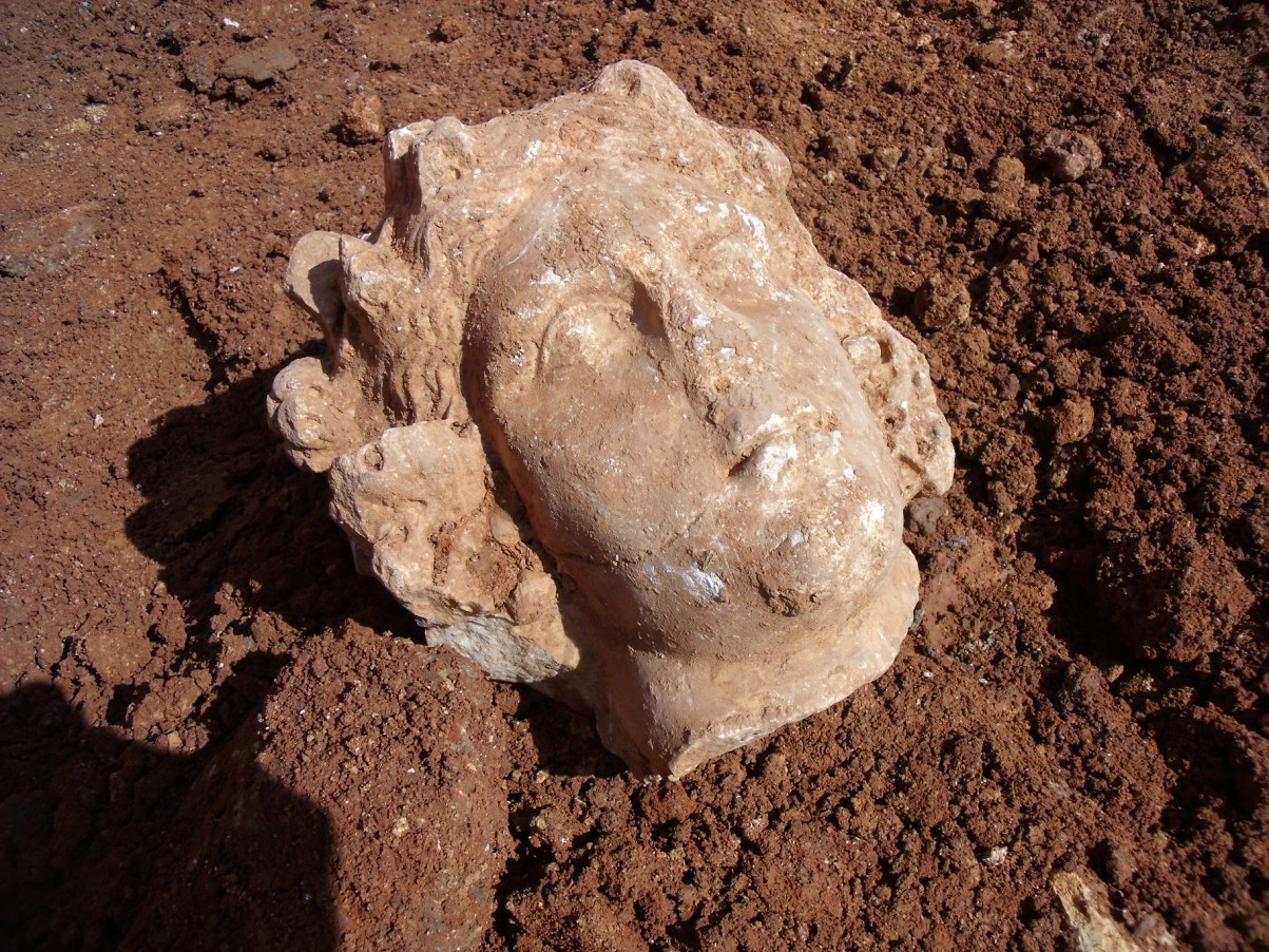 Cap escultòric del déu Bacus recuperat als treballs de la vil·la romana del Pont del Treball Digne (Barcelona)